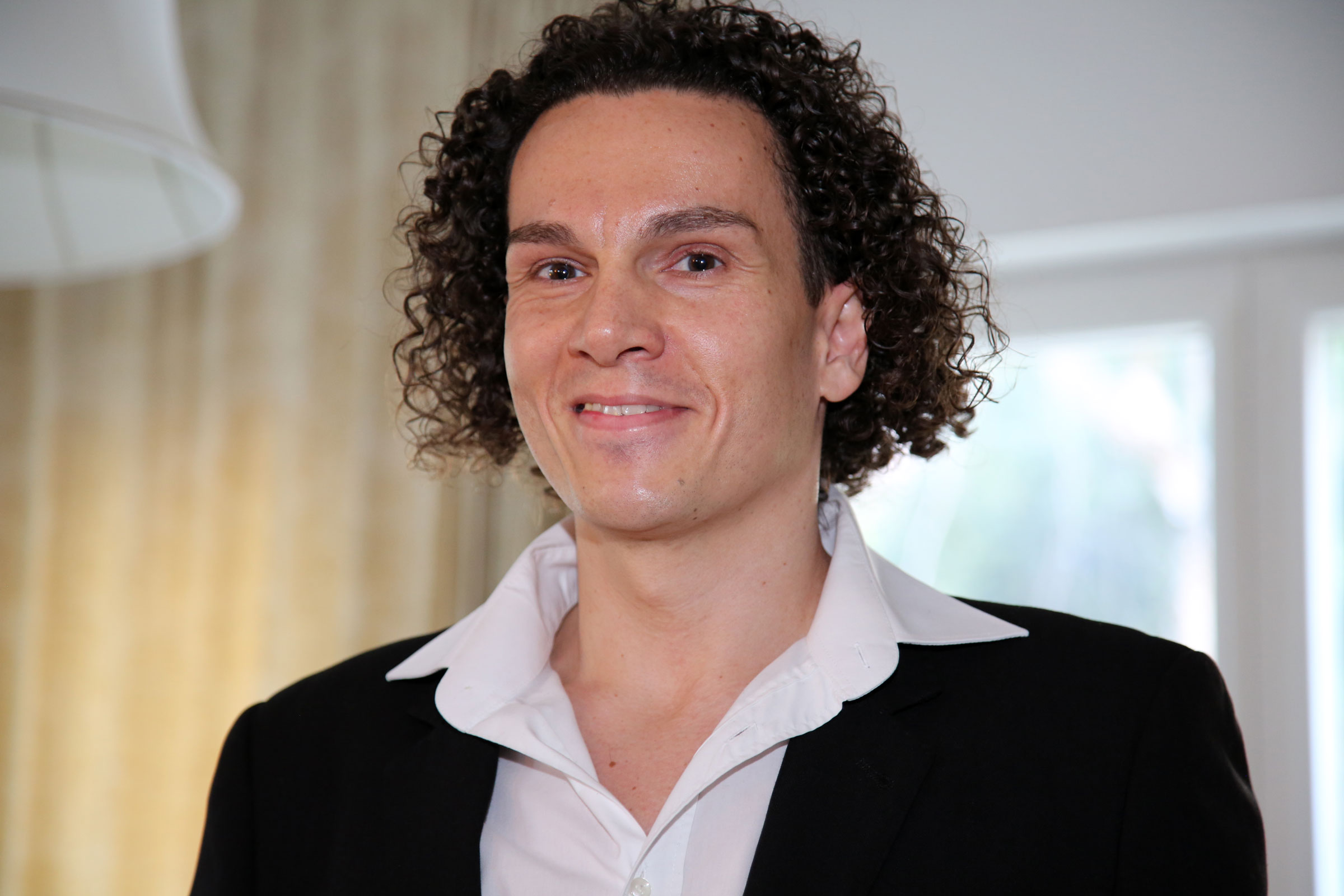 Jaburek_Gerd-9242